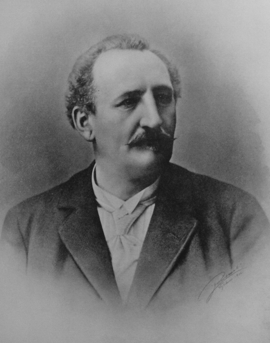 Alois Souček Starosta města Vyškov 1903 - 1910